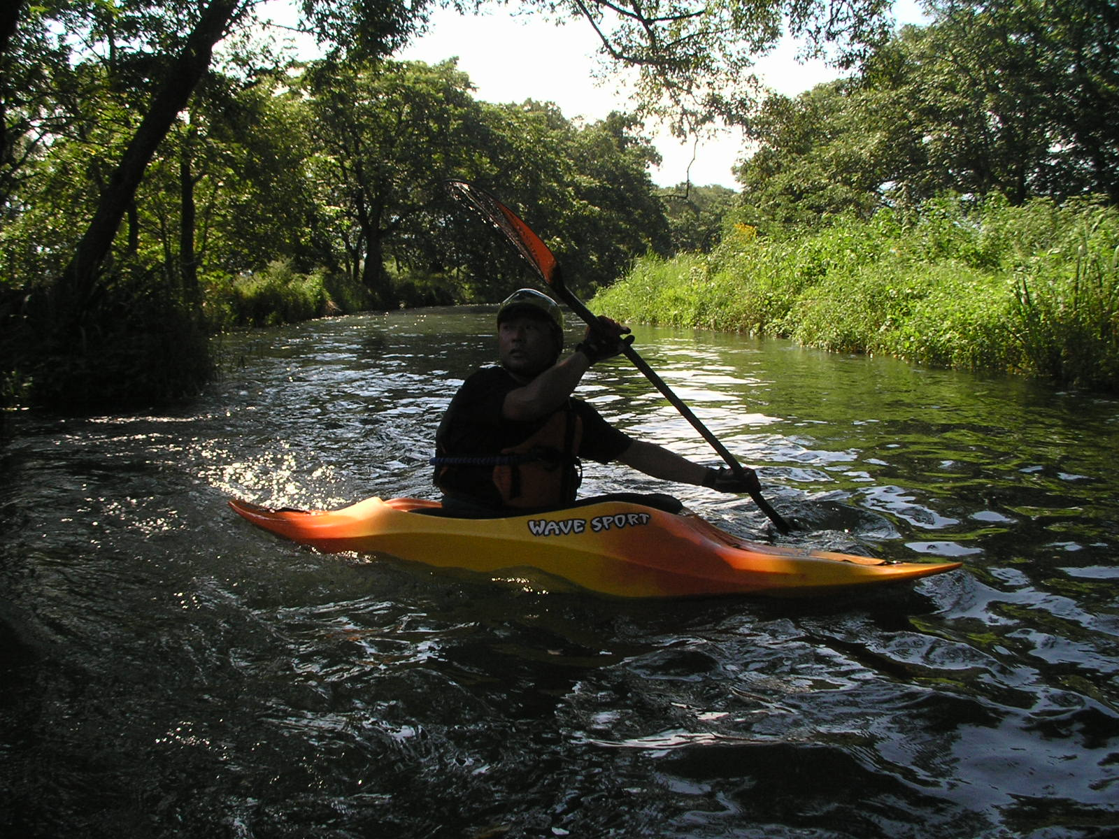 2007-08-13 Yorozui-River Canoe touring 万水川カヌーツーリング（カヤック壇上晴一）